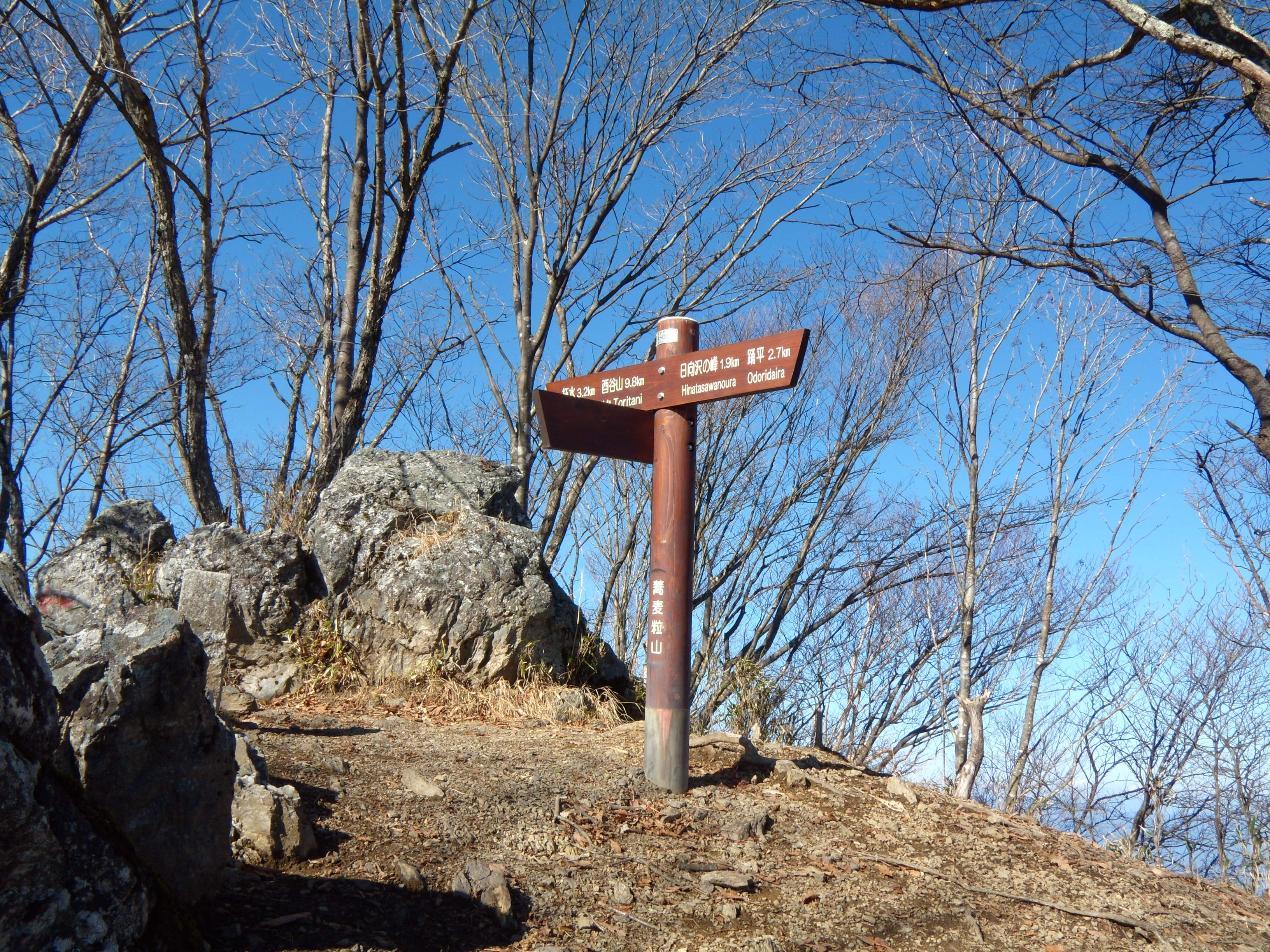 蕎麦粒山山頂